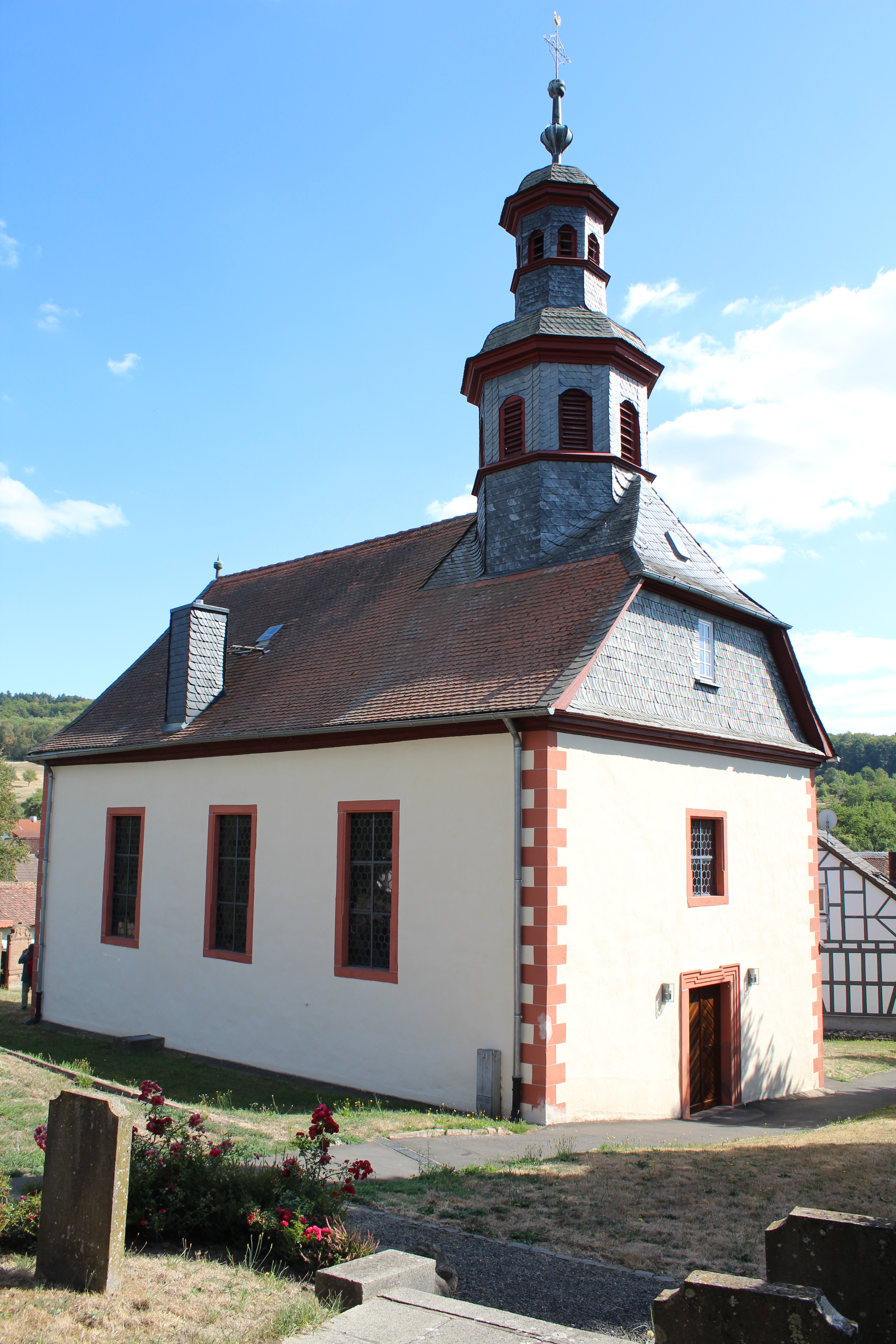 Evangelische Kirche Wallernhausen, Nidda, Wetteraukreis, Hessen, Deutschland